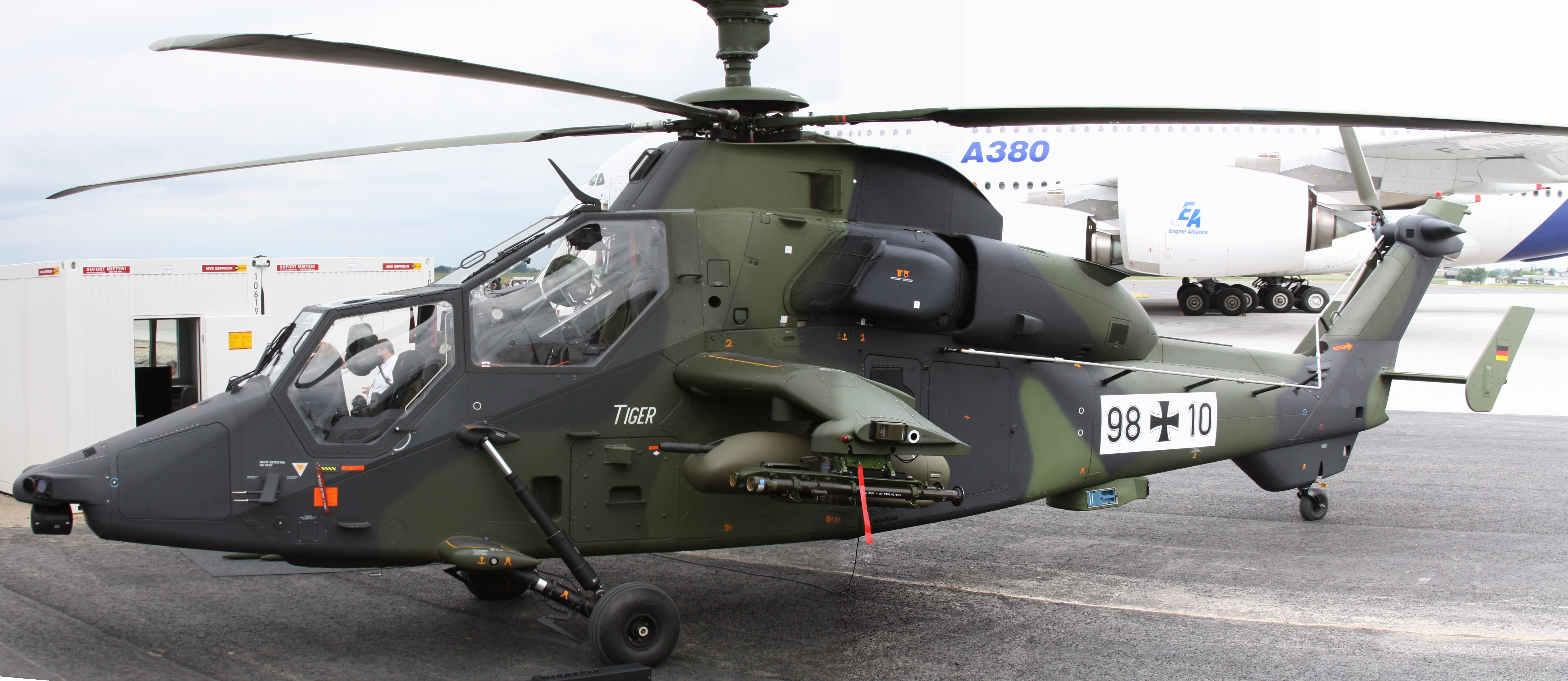 ILA 2010, am Samstag aufgenommen, meist erhöht von einer Leiter fotografiert